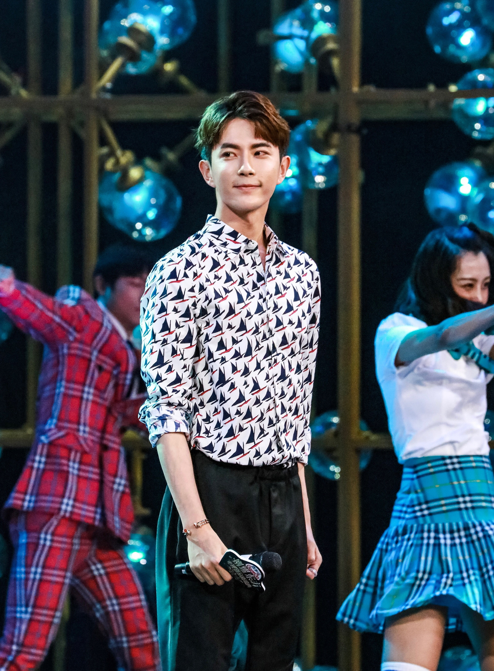 20180313 电视剧品质盛典 明星